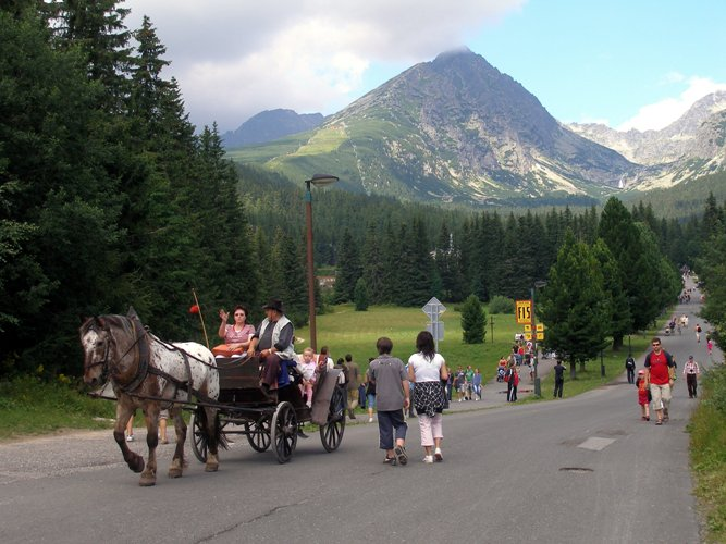 Tatranská osada Štrbské Pleso vo Vysokých Tatrách